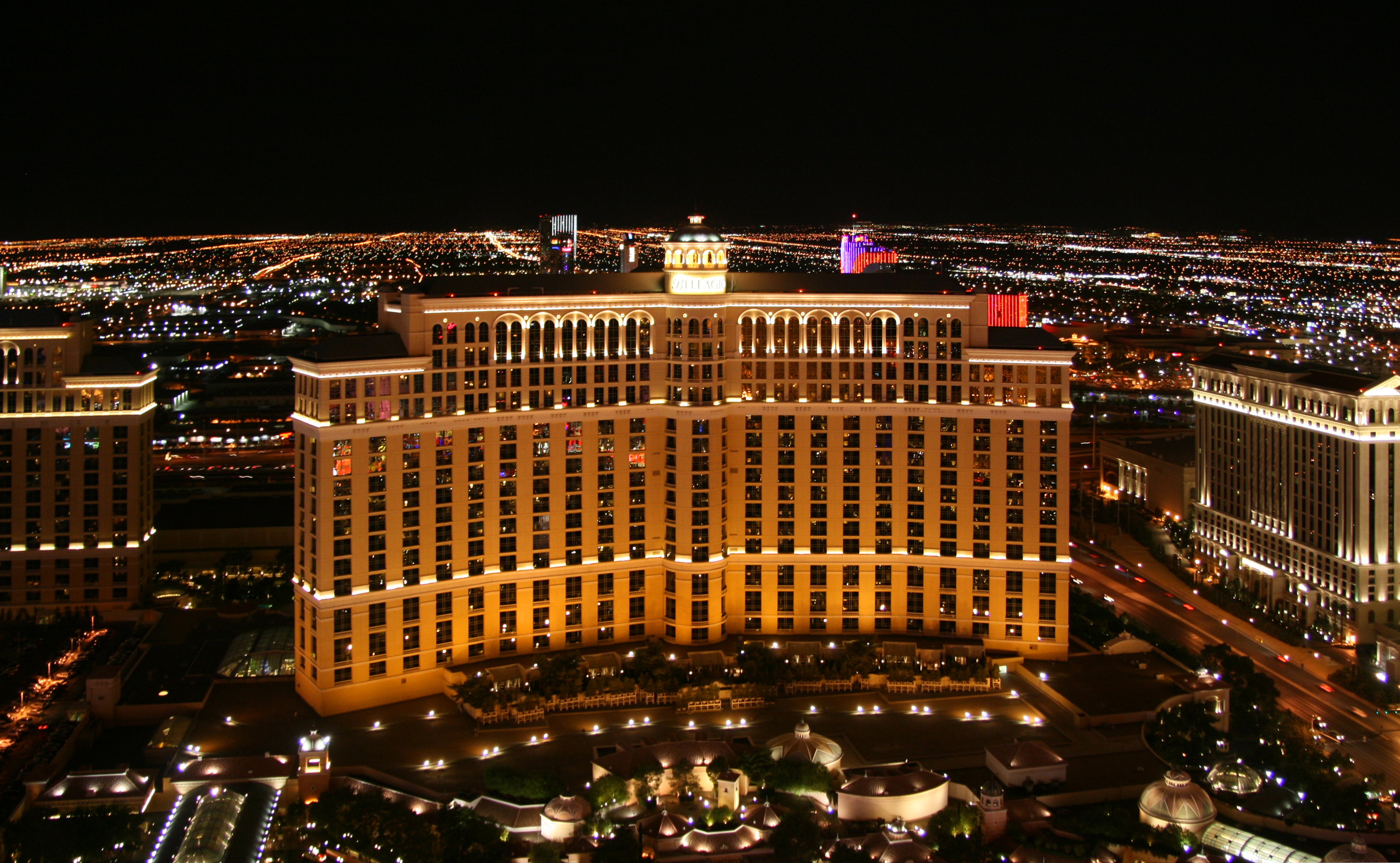 Le Bellagio Hotel & Casino de Las Vegas photographié depuis la Tour Eiffel du Paris - Las Vegas